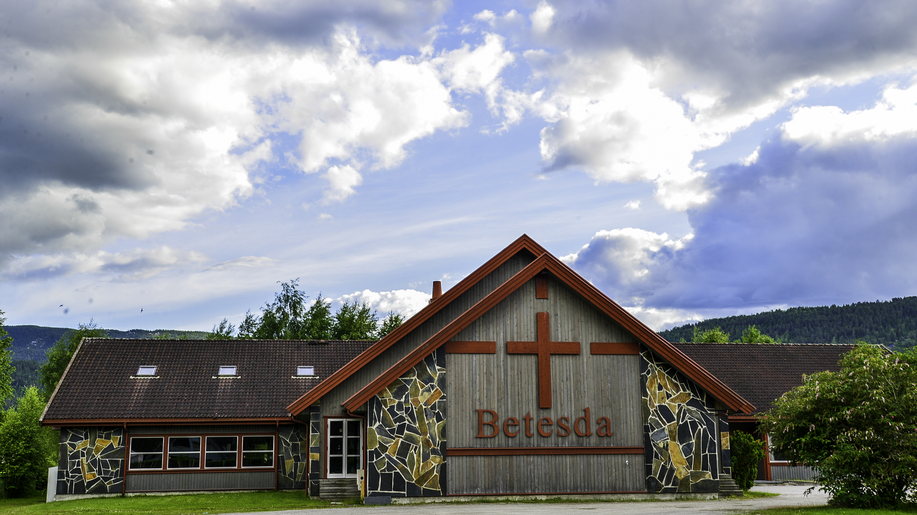 Betesda pinsemenighet i Heddal, Notodden